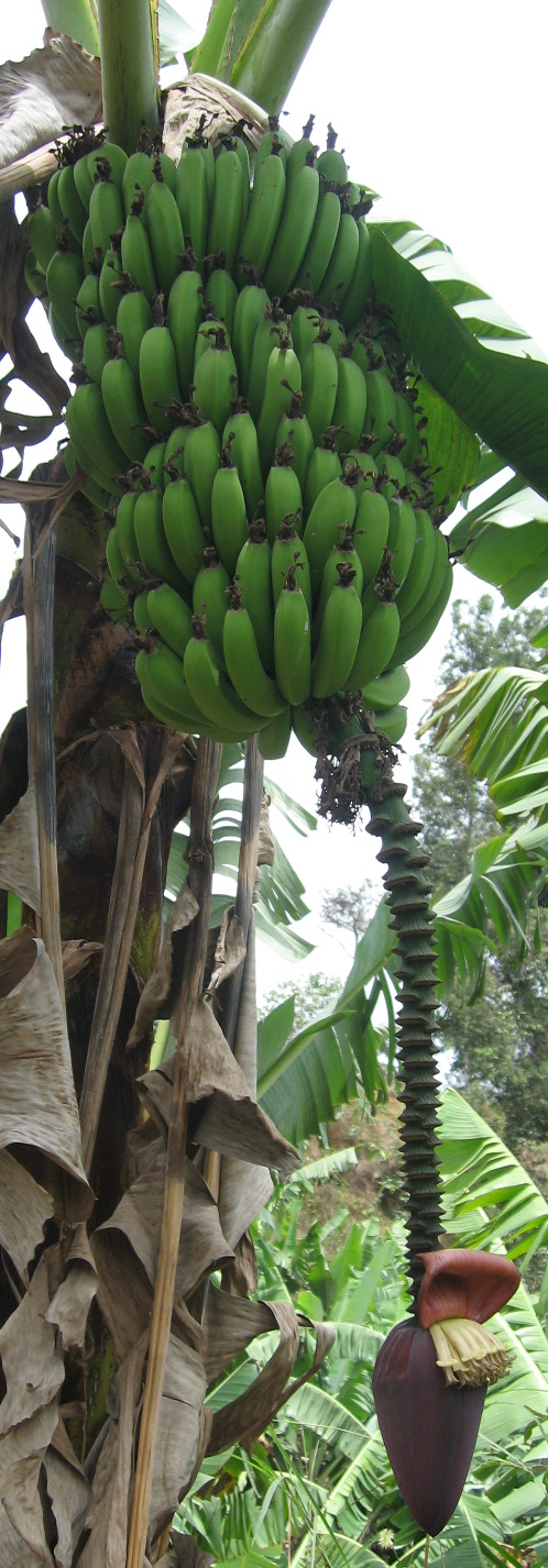 Bananier aux environs de Bana, Cameroun/Banana tree near Bana, Cameroon